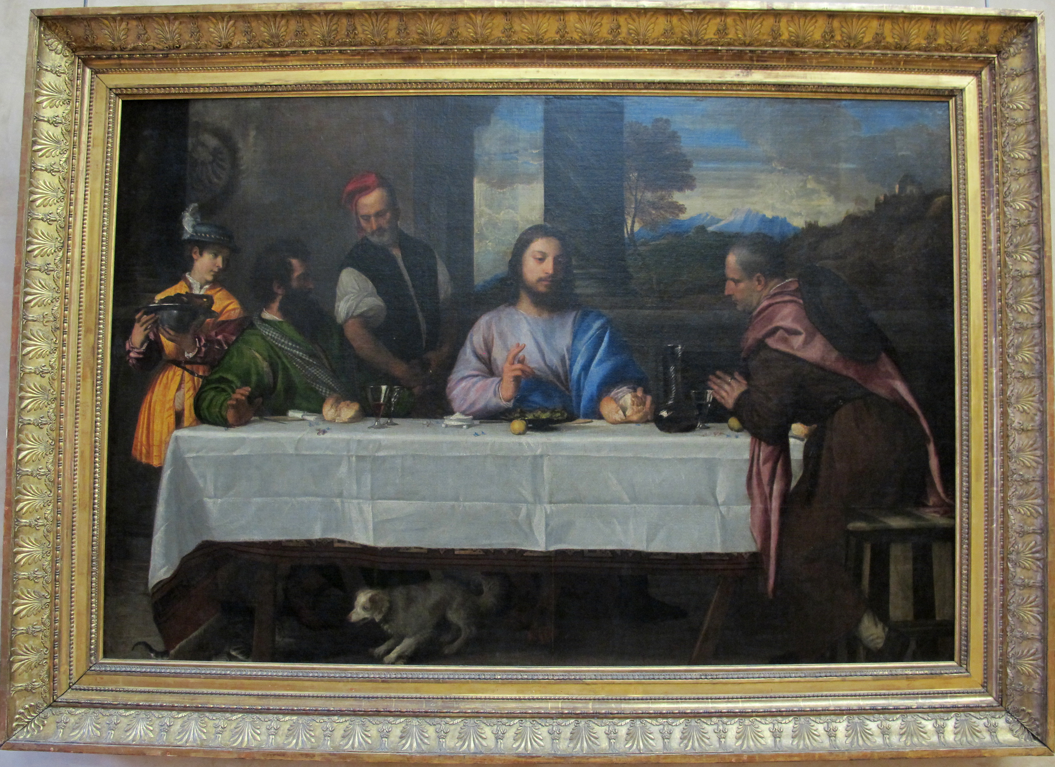 Pittura italiana del Cinquecento, Louvre